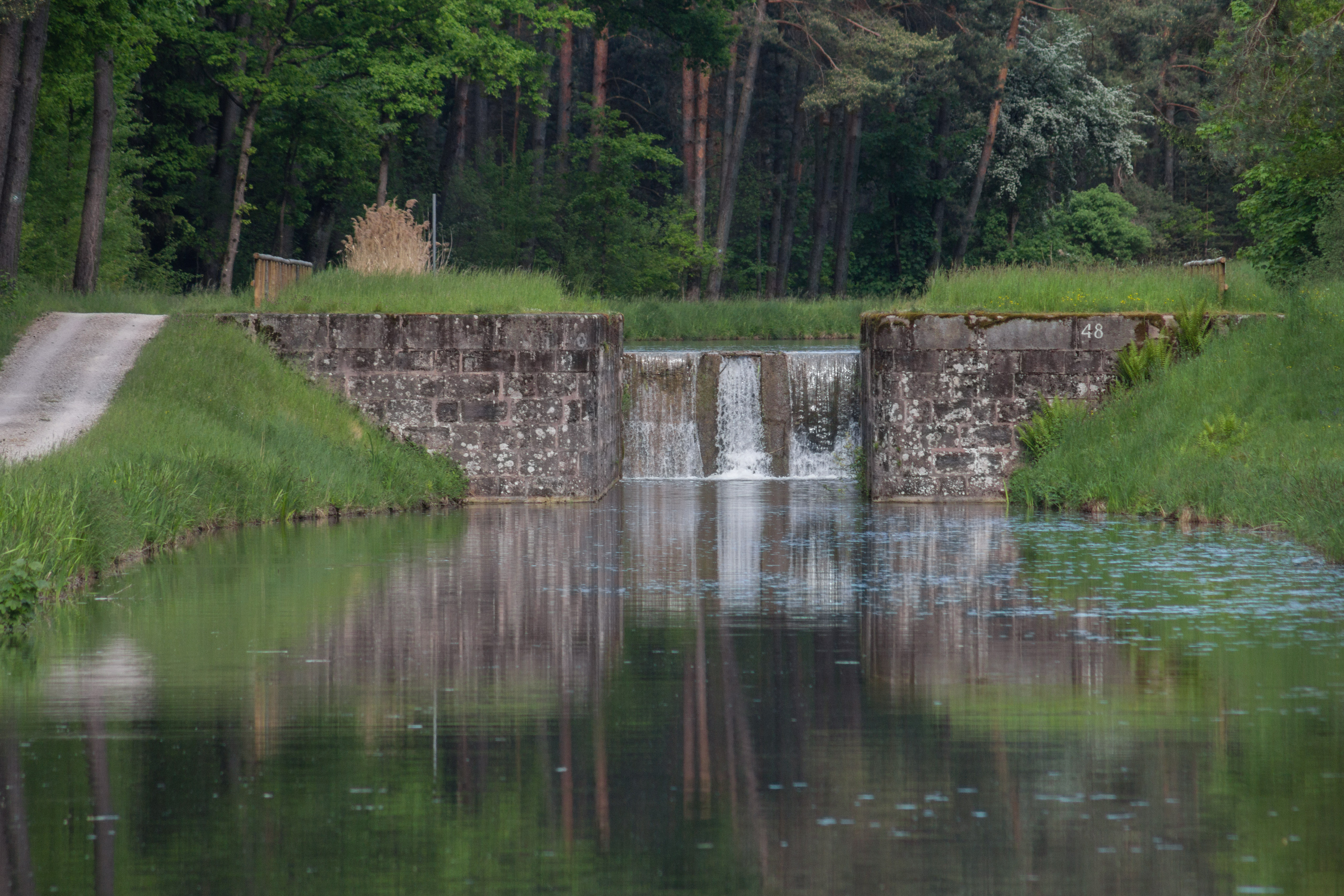 Schleuse 48, Bestandteil des Ludwig-Donau-Main-Kanals, Kammerschleuse mit Steg, Sandstein, 1836/45, SchwarzenbruckThis is a photograph of an architectural monument.